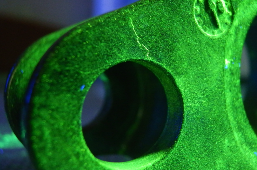 Indikace vady získaná magnetickou metodou práškovou